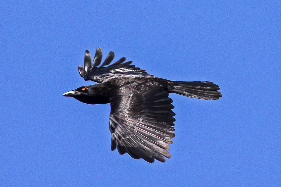 Laguna de Oviedo